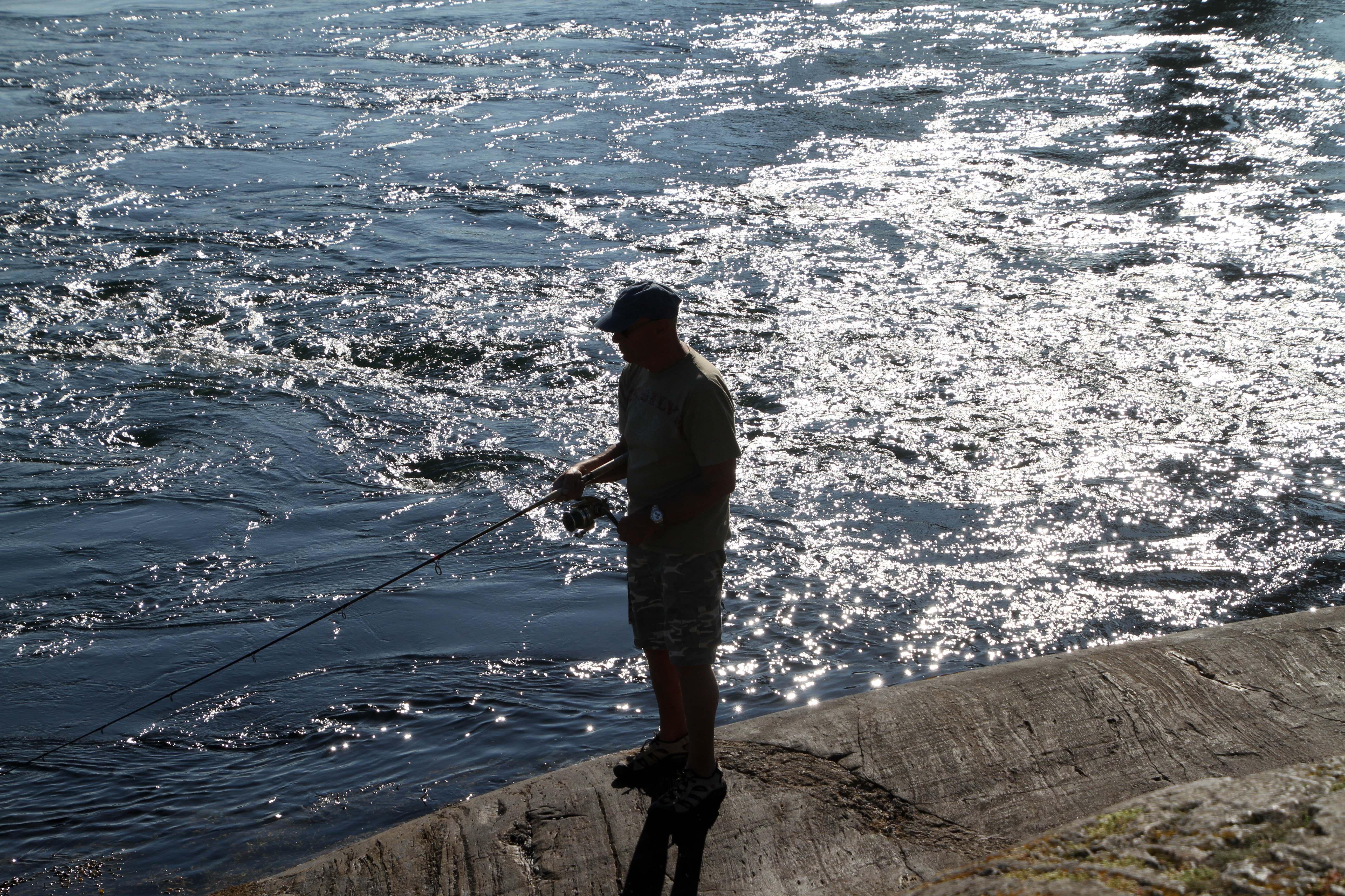 Saltstraumen, Norwegen